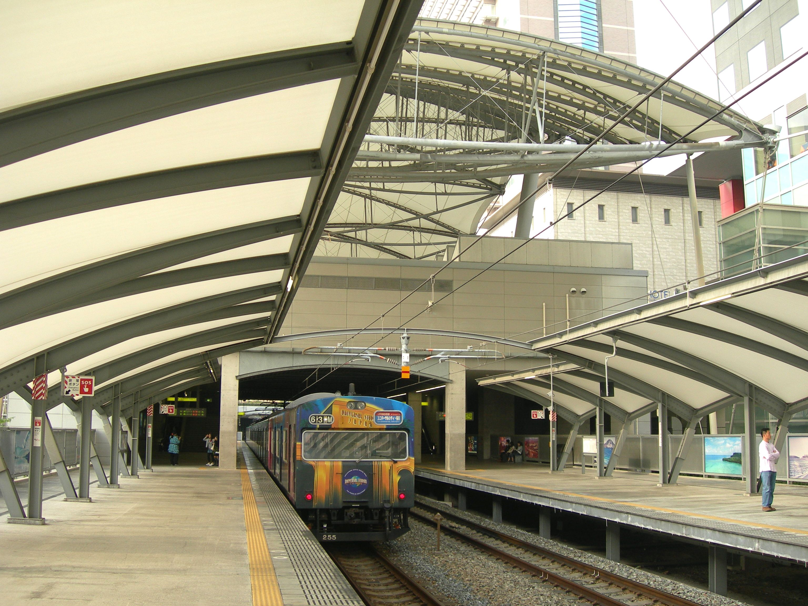 ユニバーサルシティー駅のホーム